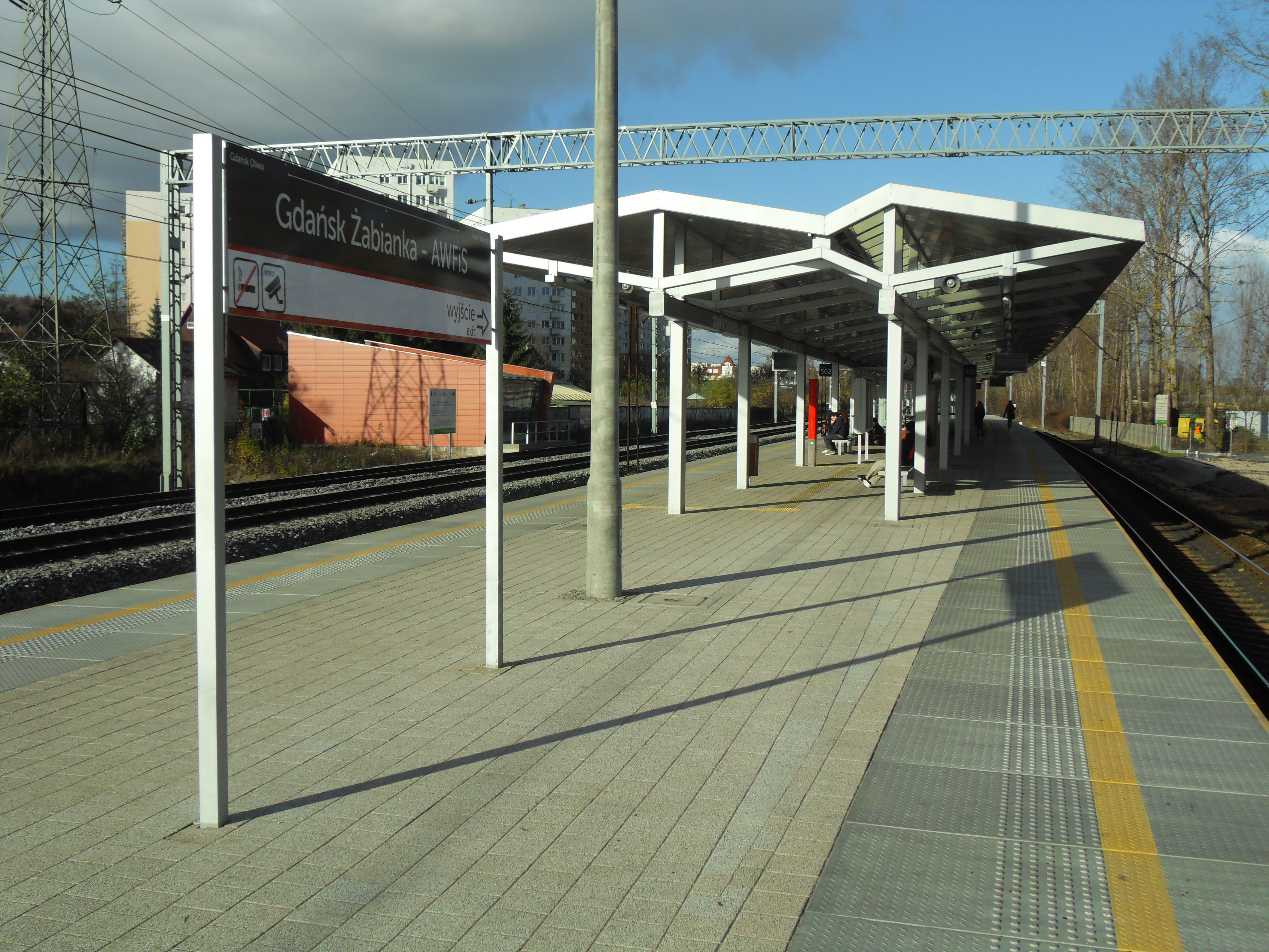 Przystanek SKM Gdańsk Żabianka-AWFiS.